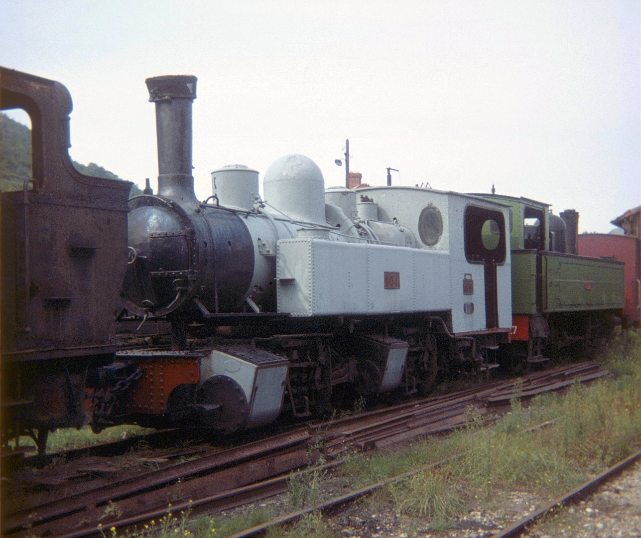 La Mallet N°104 POC du chemin de fer du Vivarais, en gare de Tournon-sur-Rhône (Ardèche) le 21 septembre 1975.